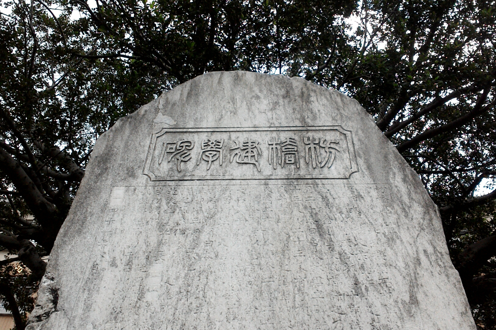 枋橋建學碑碑額,新北市板橋區黃石里